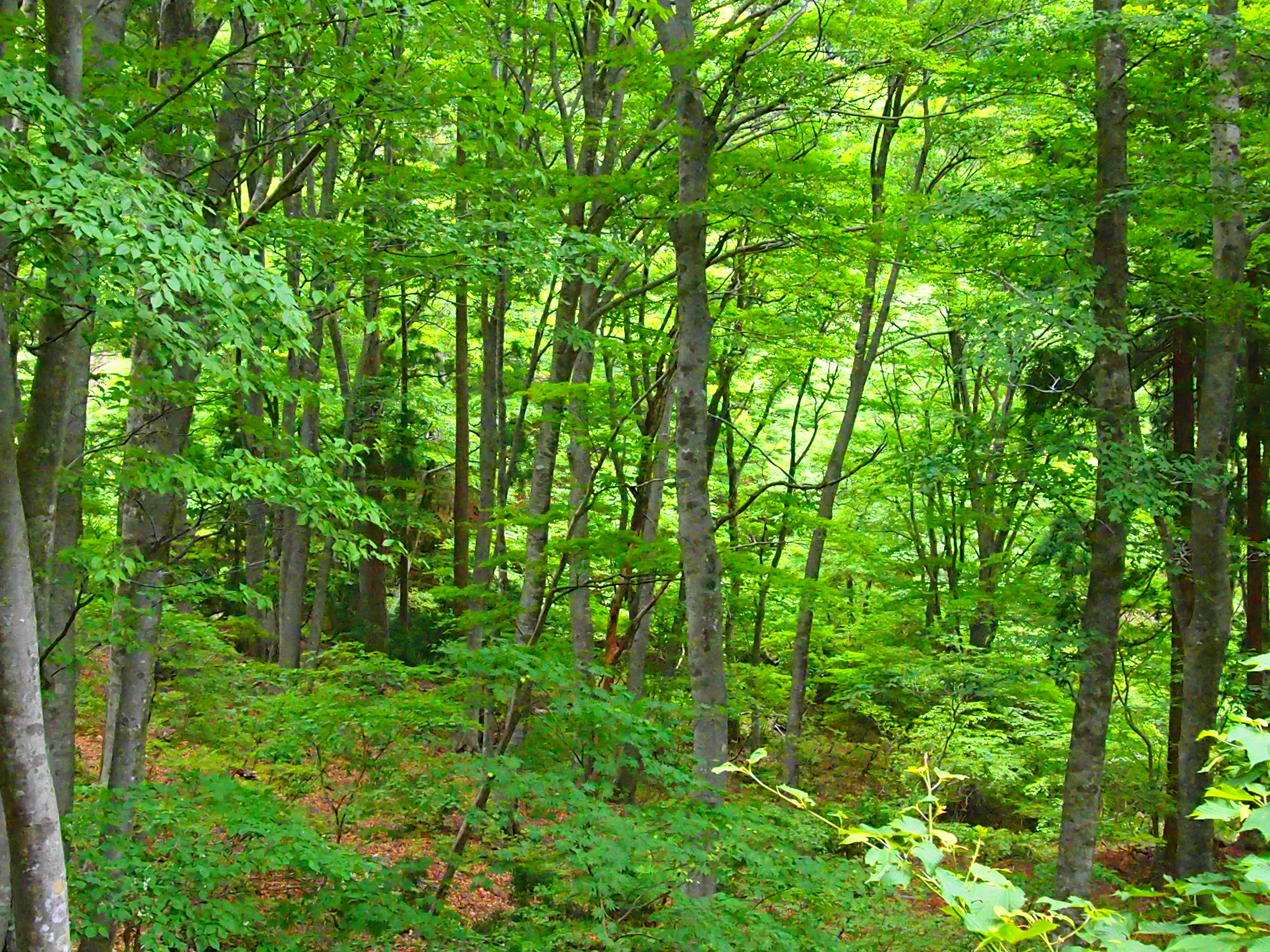 滋賀と福井の県境の福井県側、黒河峠から三国山付近の93haが、天然のブナ、スギ、ミズナラ、イヌシデなどの遺伝資源を保存するために保護されており、黒河山林木遺伝資源保存林に指定されている